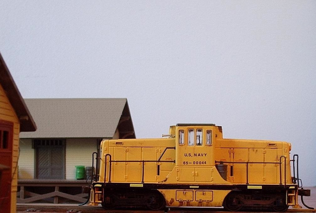 US Navy 44T locomotive 6500044 model (HO scale)